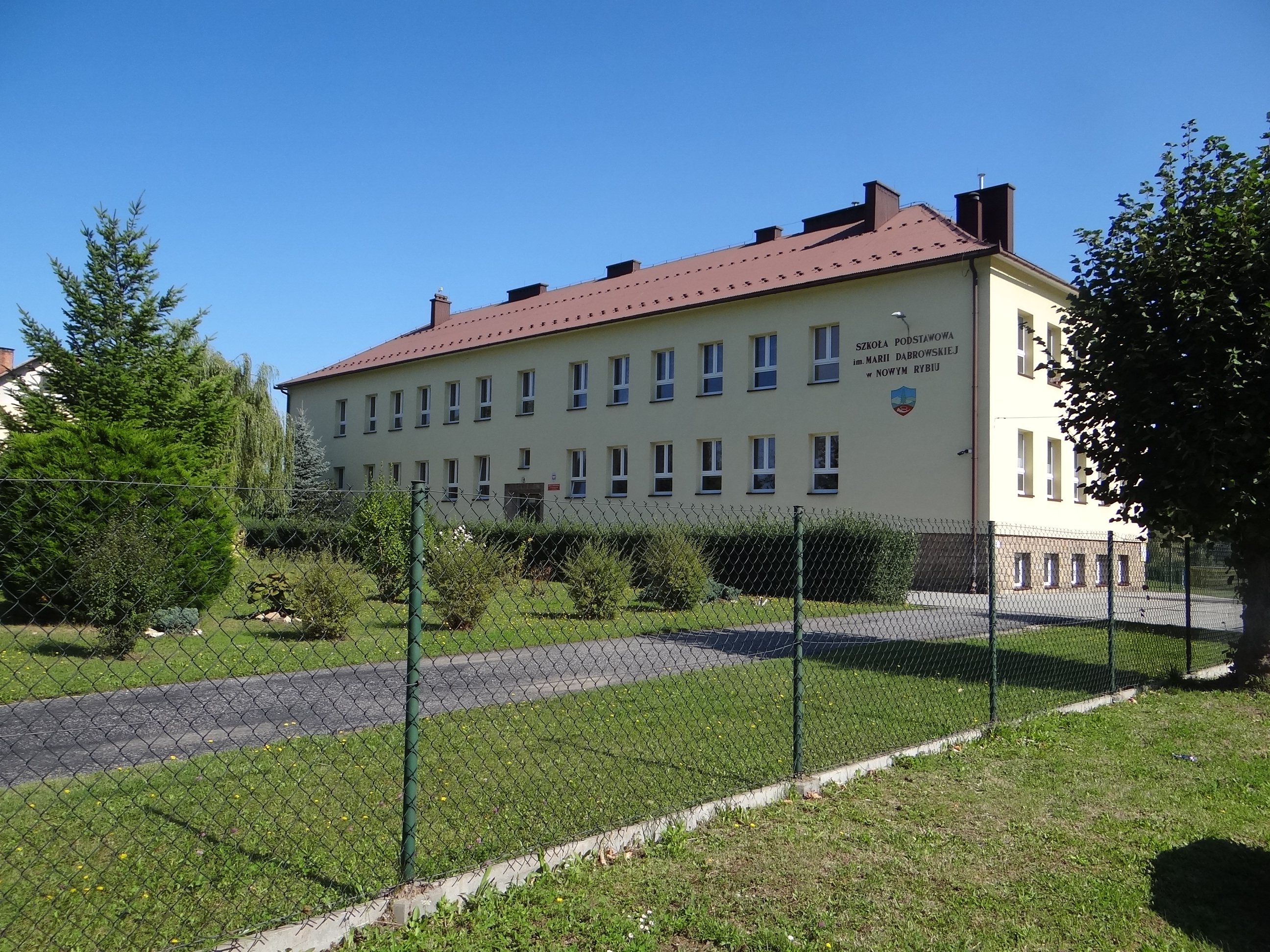 Szkoła W Nowym Rybiu